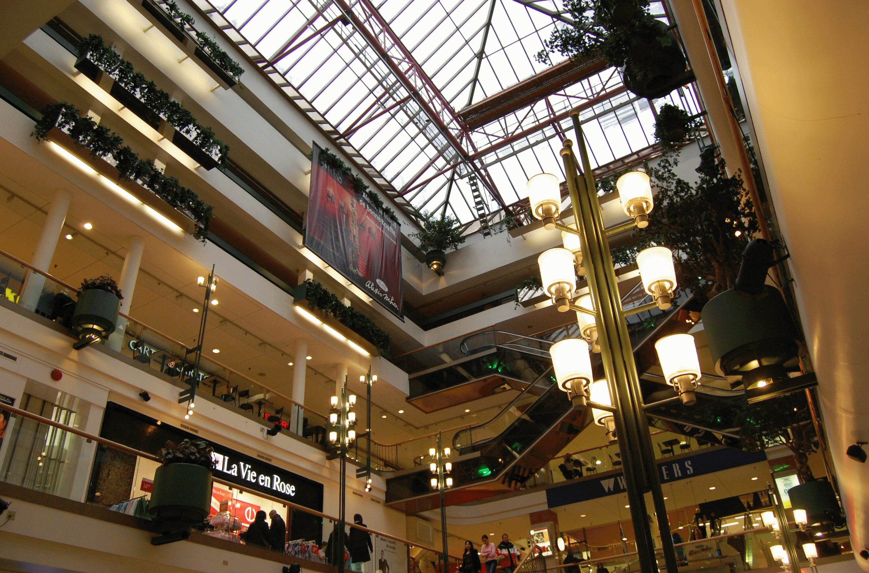 Centre d'achat Alexis Nihon, Montréal